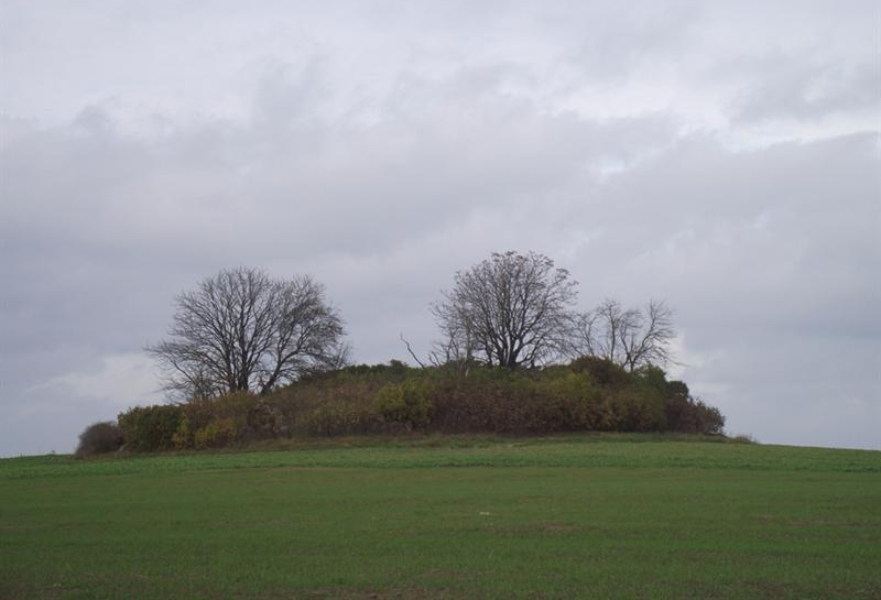 Akmenių kaimo senosios kapinės